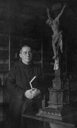 Marian František Schaller (1892 - 1955), Český římskokatolický kněz.